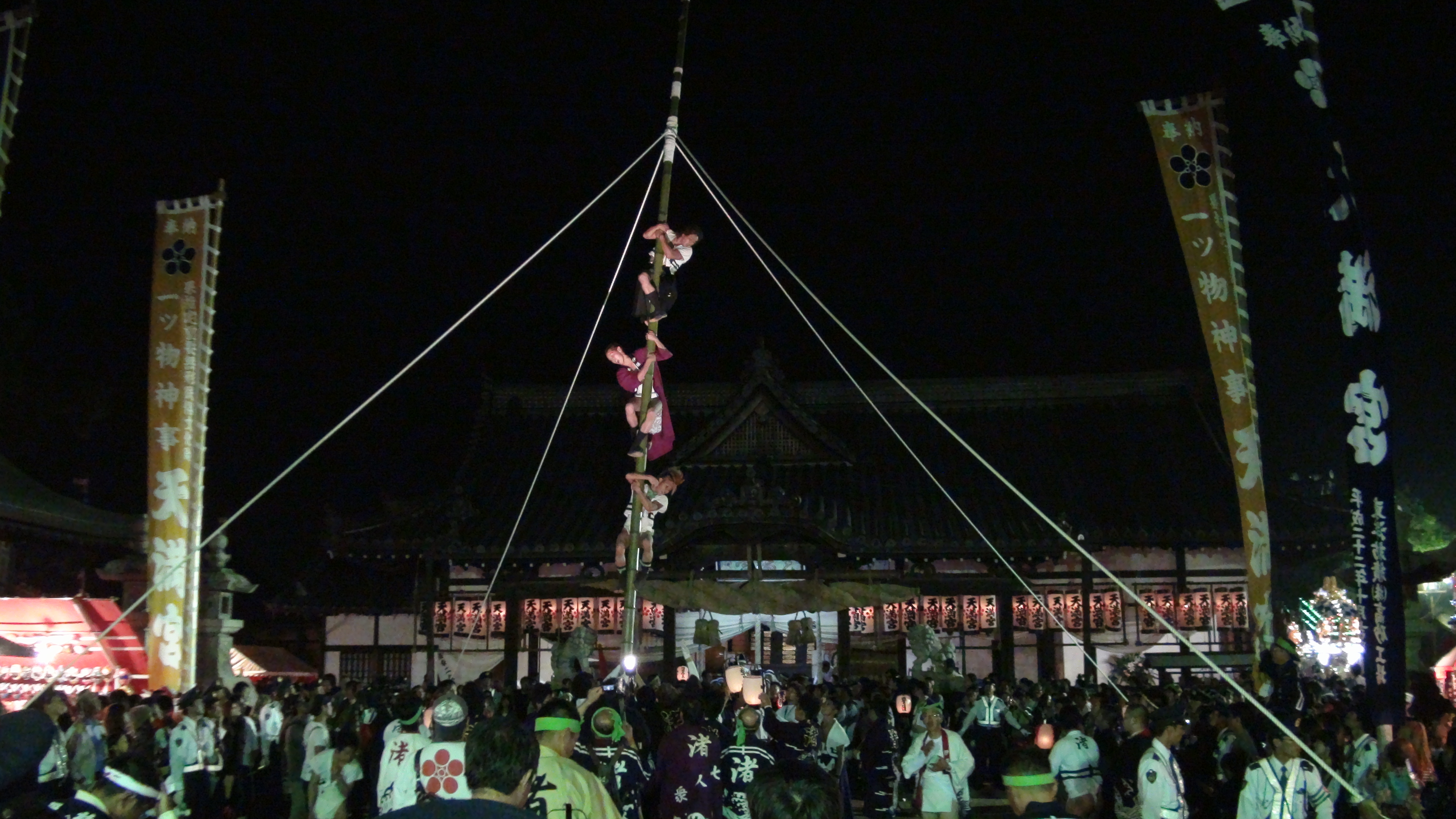 曽根天満宮 秋季例大祭 竹割り （2010年10月）